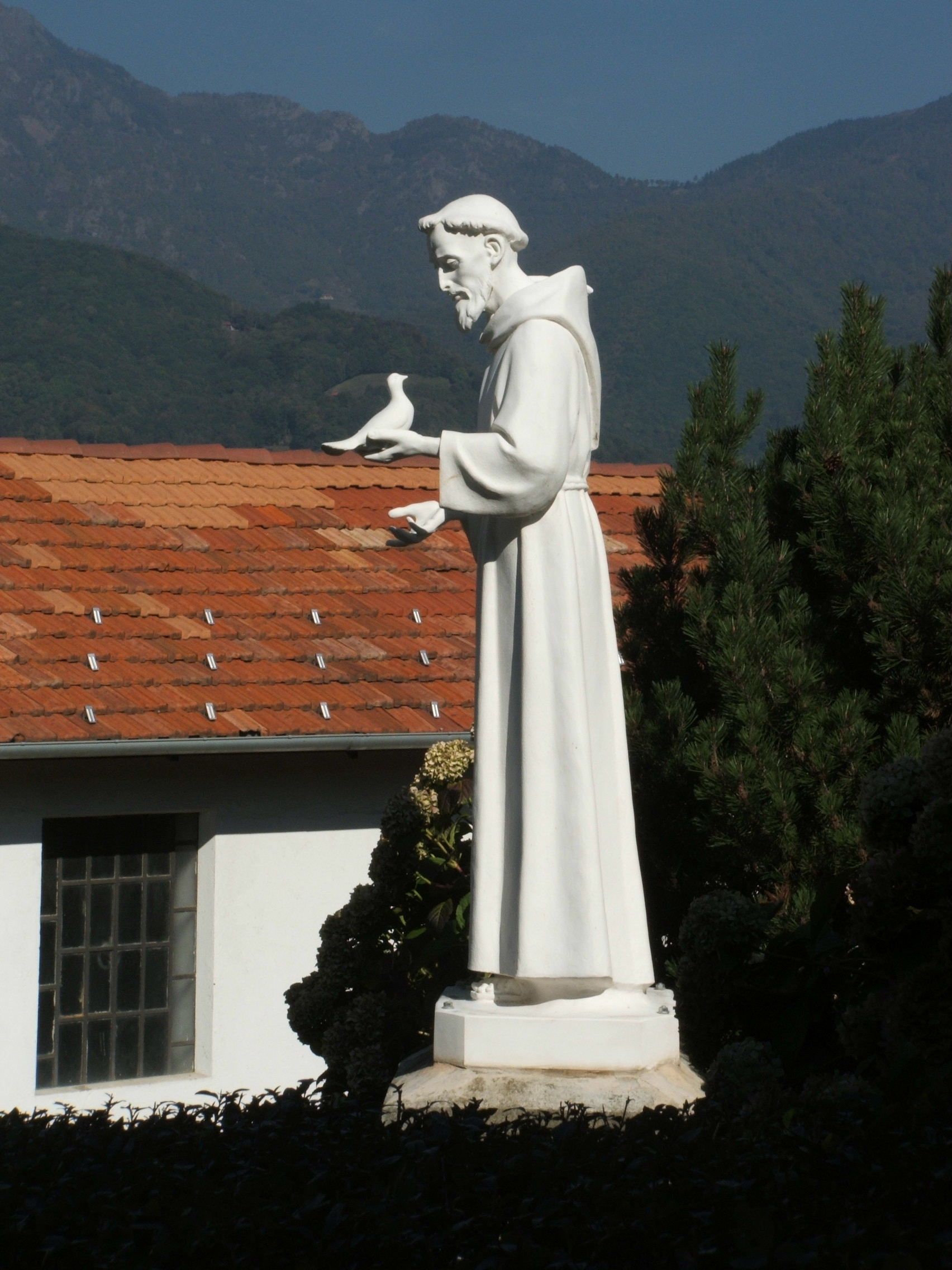 Santuario di Banchette a Bioglio (provincia di Biella, Piemonte, Italia) 12